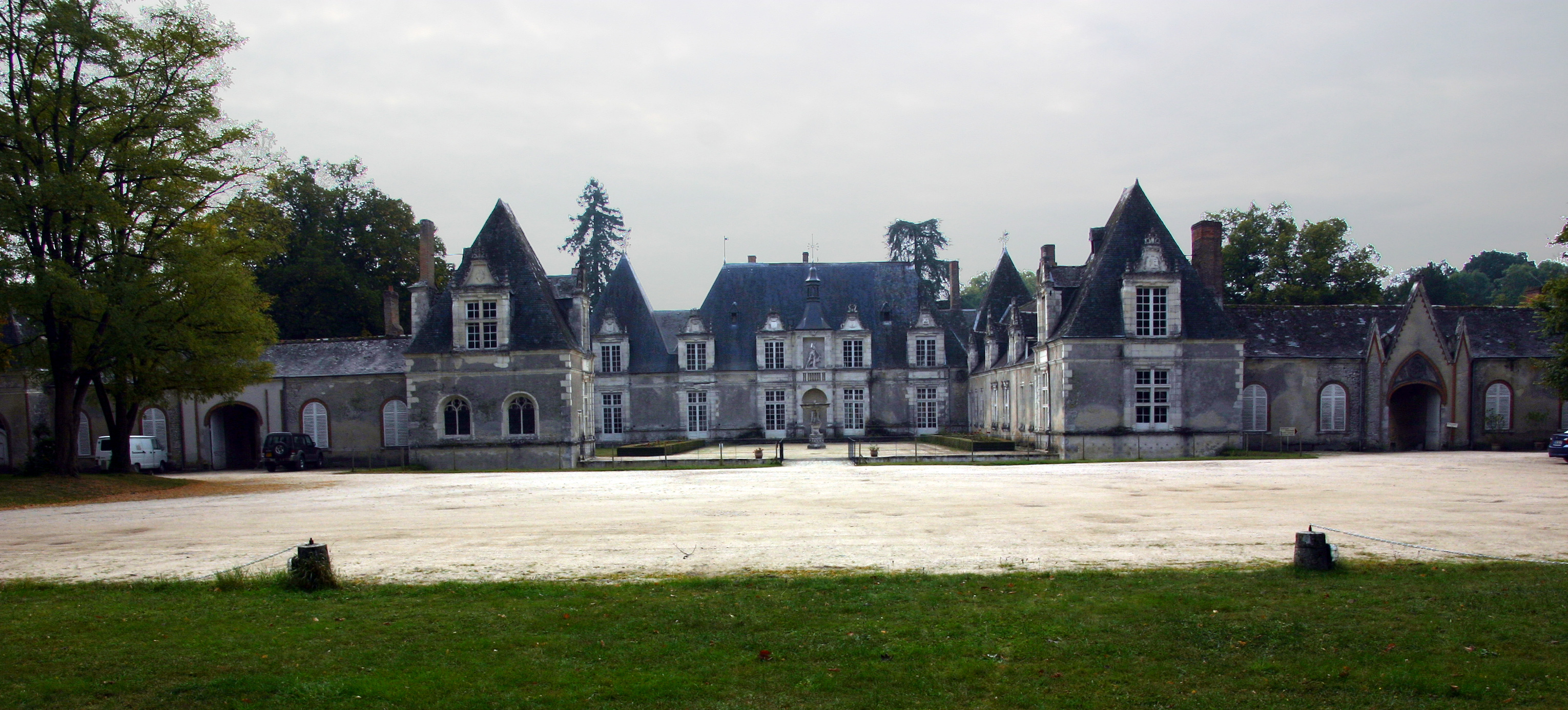 Château de Villesavin